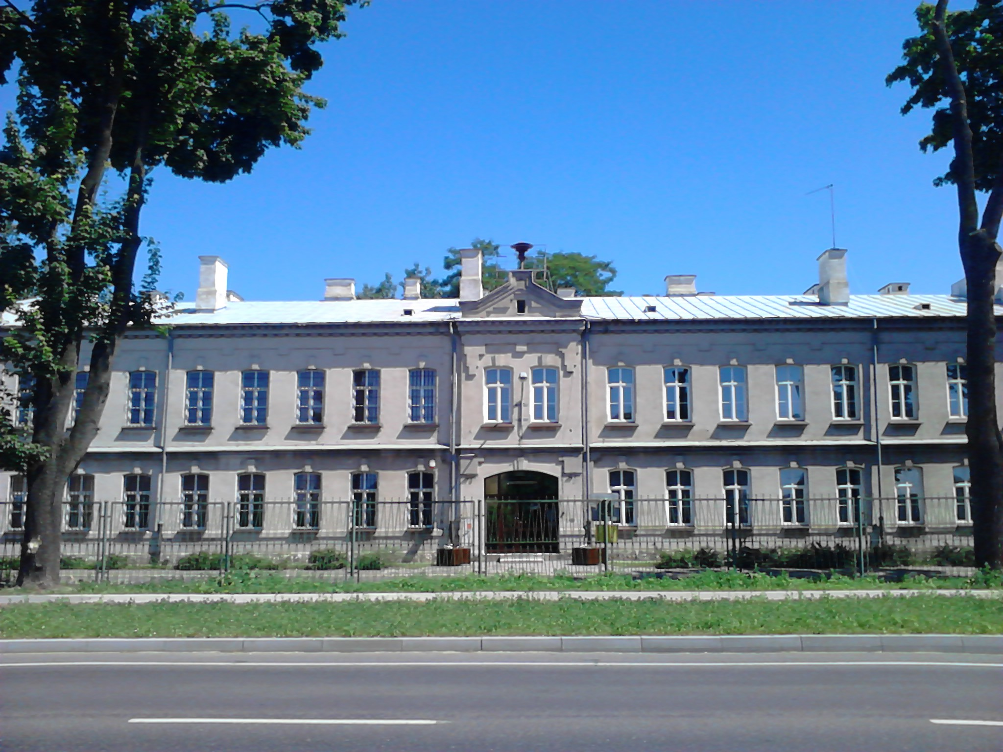 Zabytkowy budynek koszar rosyjskich przy ul. Makowskiej w Przasnyszu, ob. 2 Ośrodek Radioelektroniczny